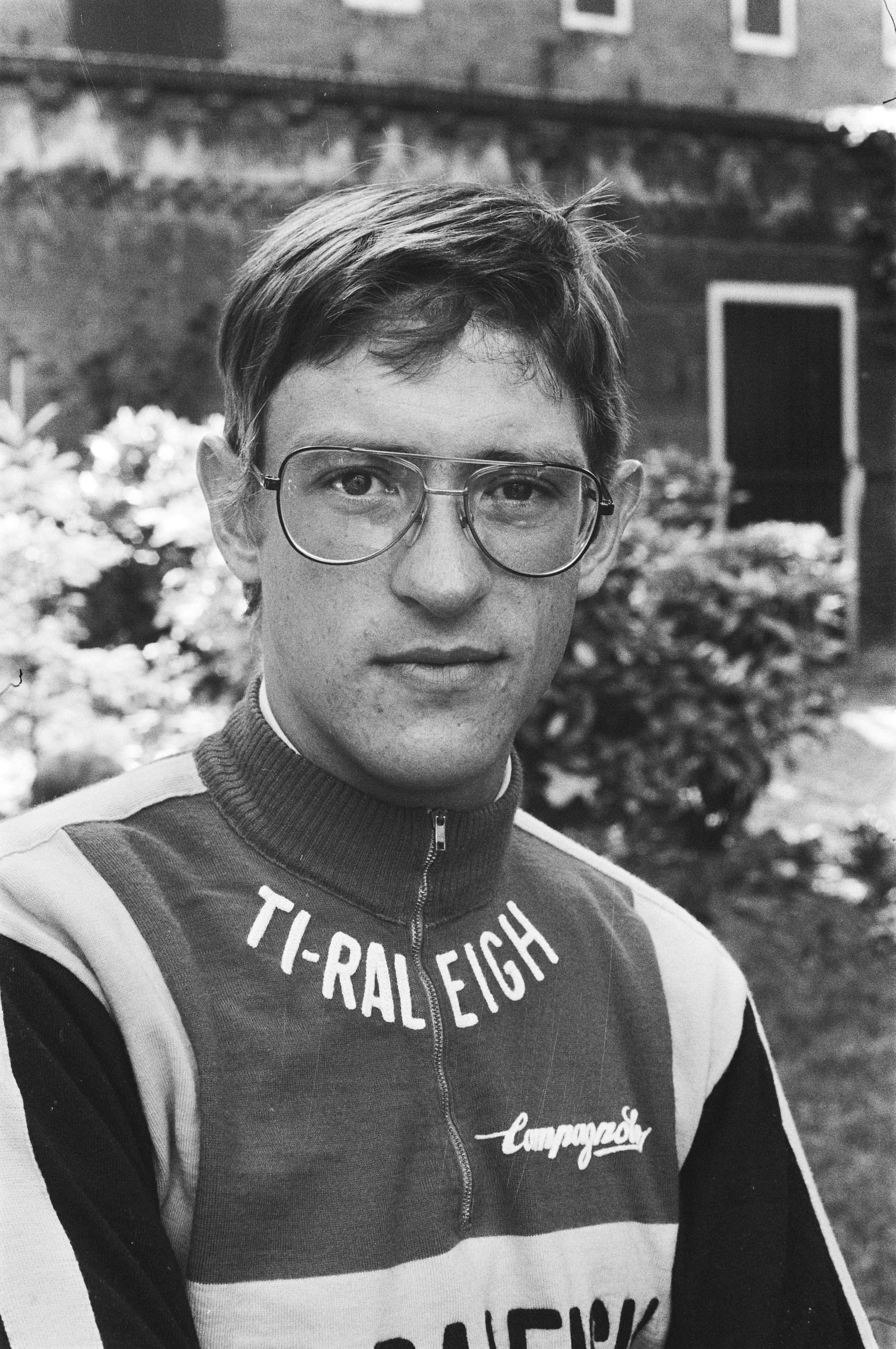 Collectie / Archief : Fotocollectie Anefo Reportage / Serie : [ onbekend ] Beschrijving : Presentatie Nederlandse wielerploegen Raleigh en Frisol, deelnemers aan Tour de France; Gerrie Knetemann (Raleigh) Datum : 27 juni 1977 Trefwoorden : portretten, sport, wielrennen Persoonsnaam : Knetemann Gerrie Instellingsnaam : Raleigh Fotograaf : Verhoeff, Bert / Anefo Auteursrechthebbende : Nationaal Archief Materiaalsoort : Negatief (zwart/wit) Nummer archiefinventaris : bekijk toegang 2.24.01.05 Bestanddeelnummer : 929-2454